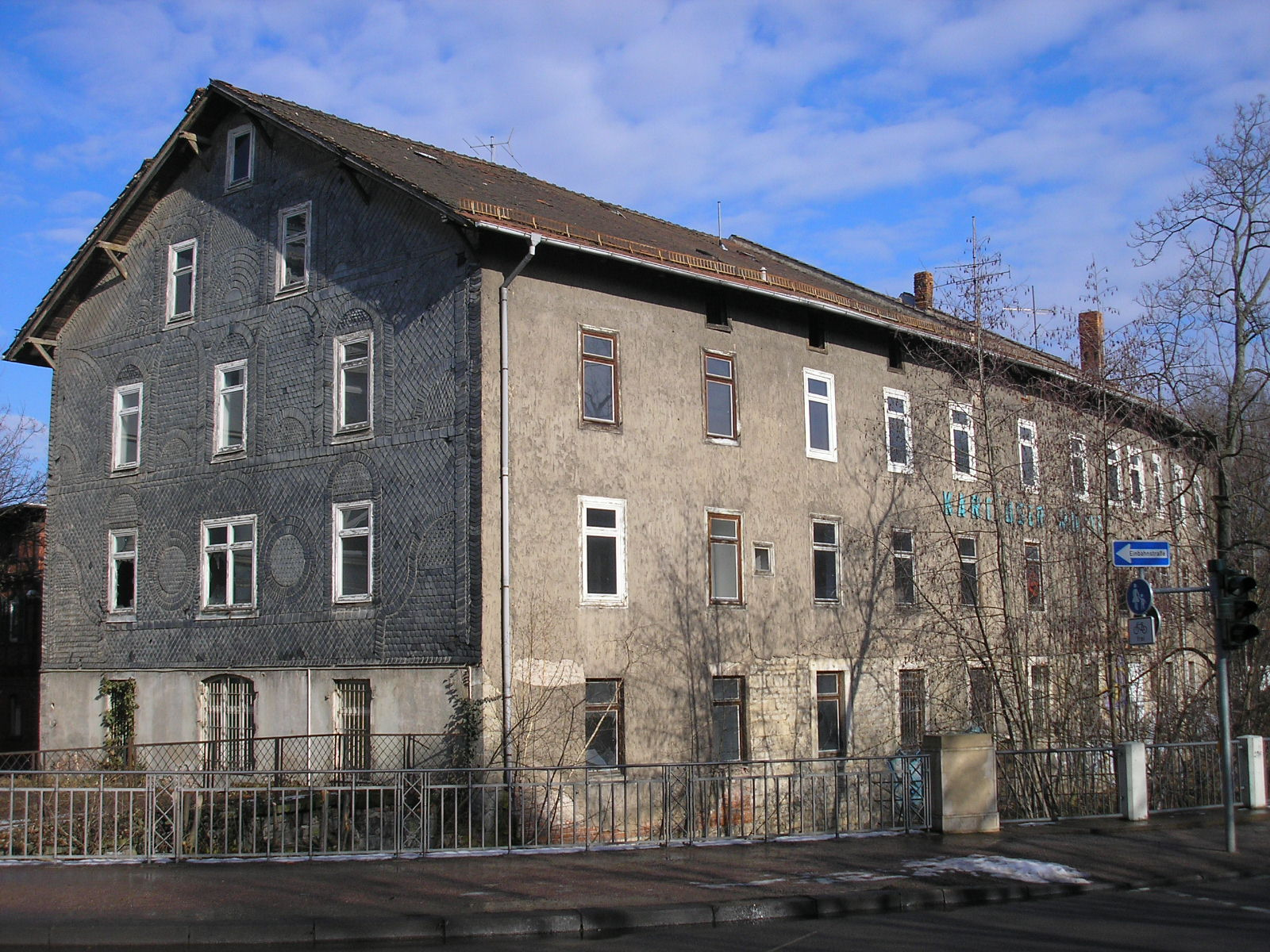 Die am Walkstrom gelegene ehemalige Kartäusermühle in der Straße des Friedens - Erfurt, Thüringen, Deutschland.